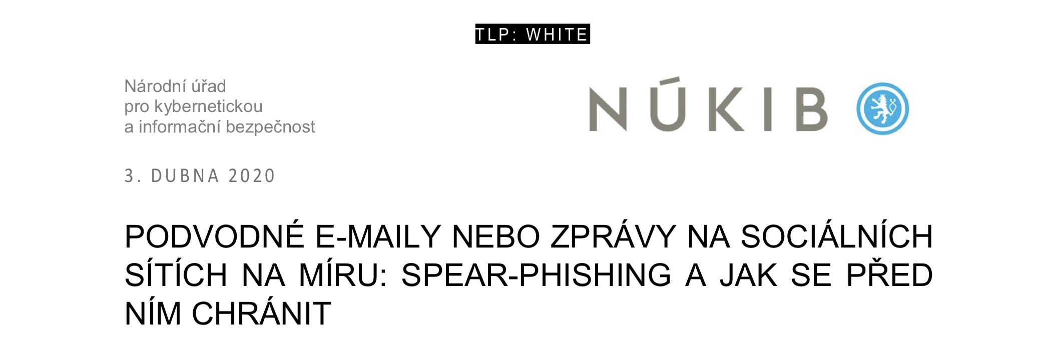 Dokument označený v hlavičce protokolem TLP